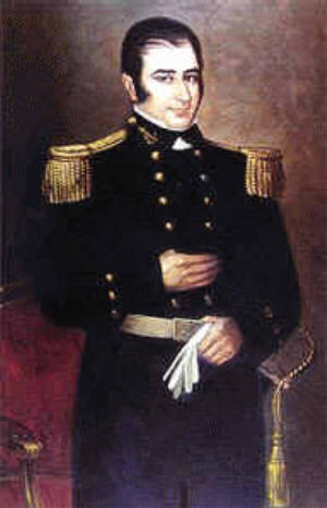 Retrato de Hipólito Bouchard (1780-1837)